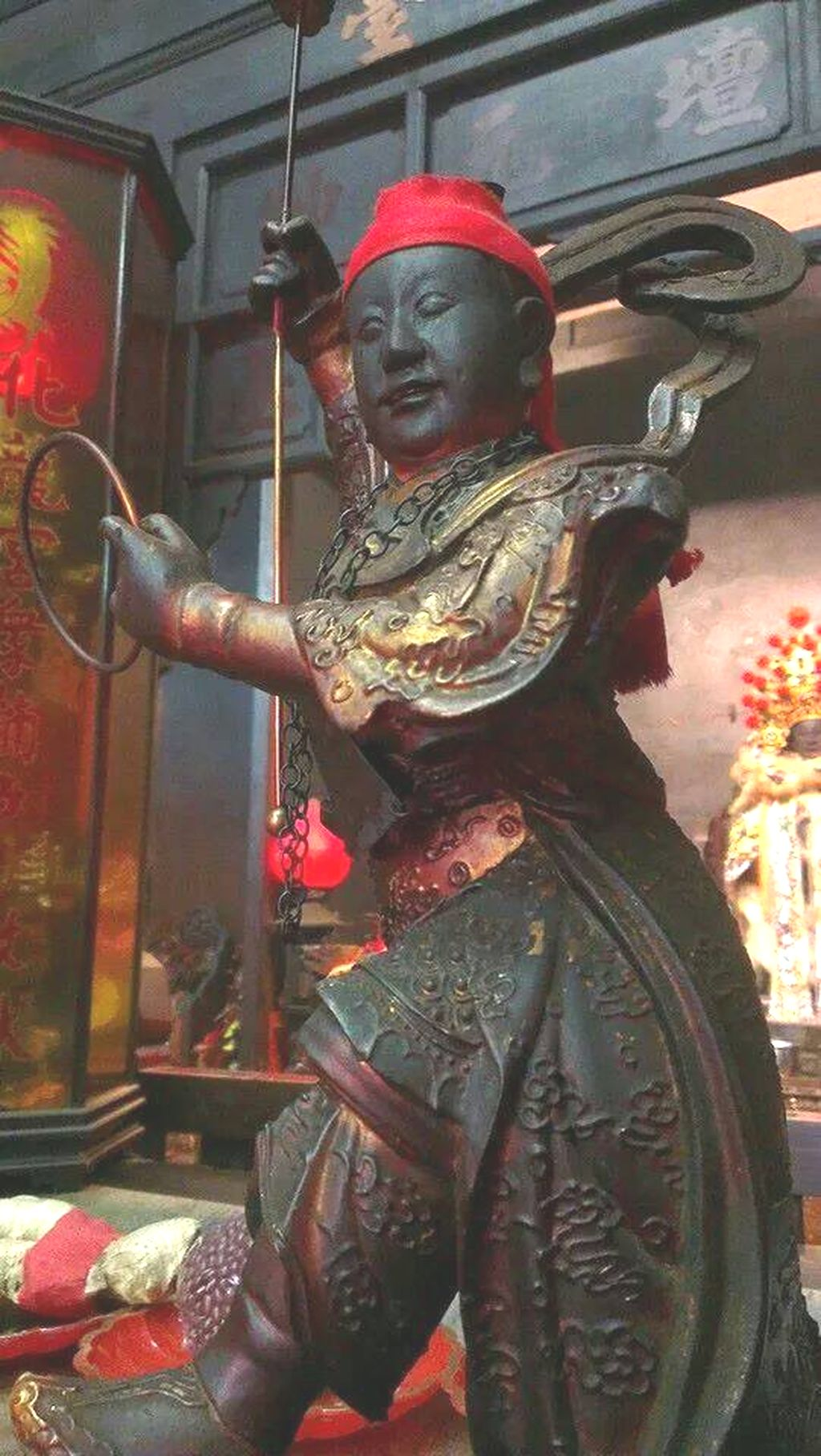 龍水港化龍宮位在高雄市鼓山區龍水裡河西一路1357號。